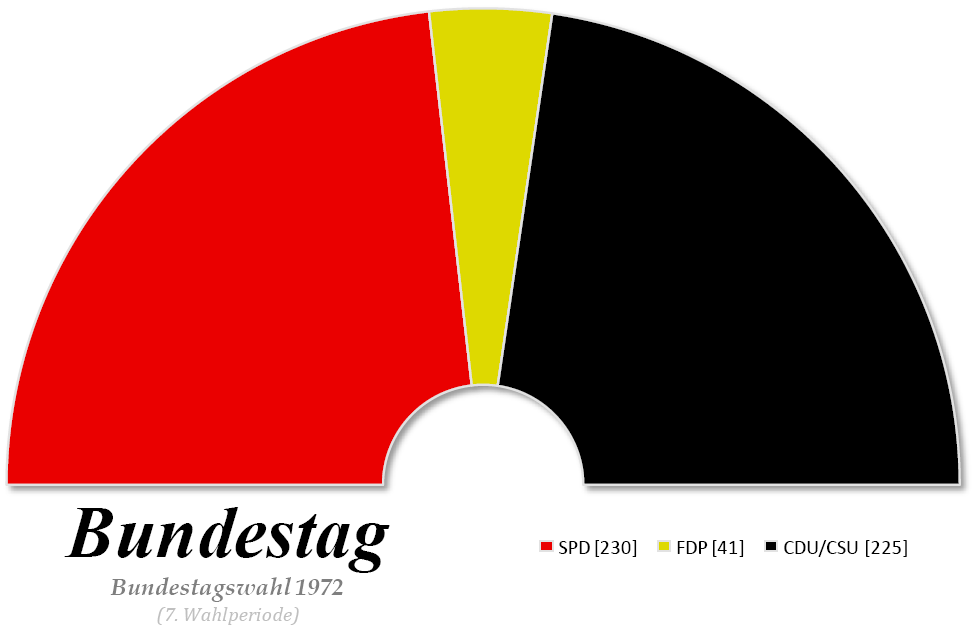 Projection graphique de la composition du 7ème Bundestag élu en 1972